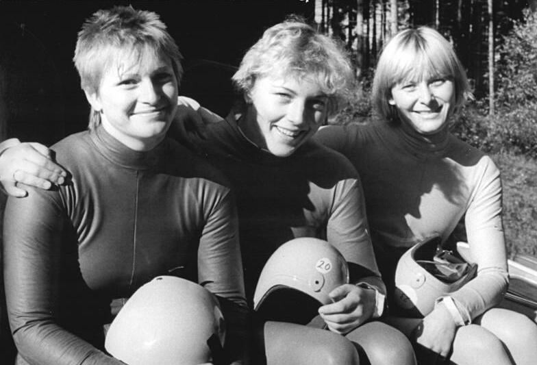 Cerstin Schmidt, Birgit Görlitzer, Ute Oberhoffner ADN-ZB Schaar 18.10.1986-Oberhof: Rennschlitten-Für die Rennschlittensportler der DDR begann auf der traditionellen Oberhofer Bahn die neue Saison. Bei den Damen siegte Cerstin Schmidt vor Birgit Görlitzer und Ute Oberhoffner (v.r.n.l.).